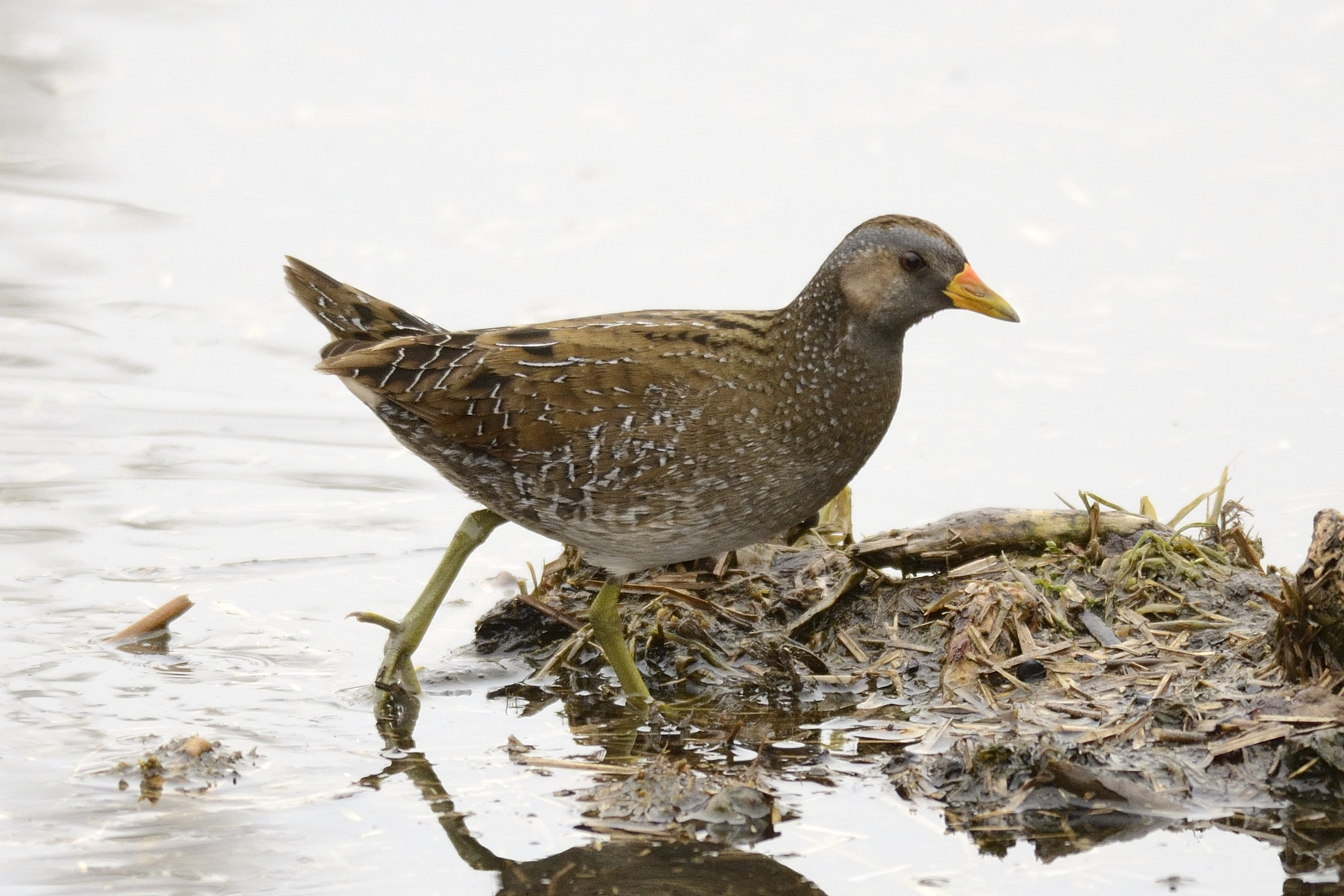 Spotted crake (Porzana porzana)